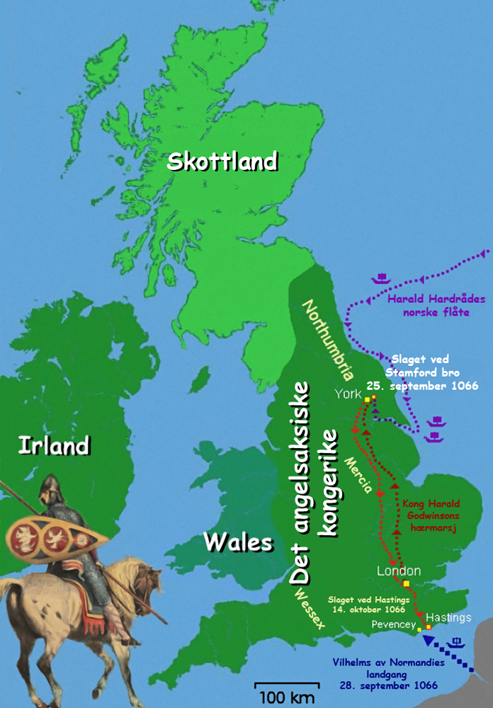 Slagene ved Stamford bro og Hastings 1066 Norsk versjon av Battle of Hastings map.jpg